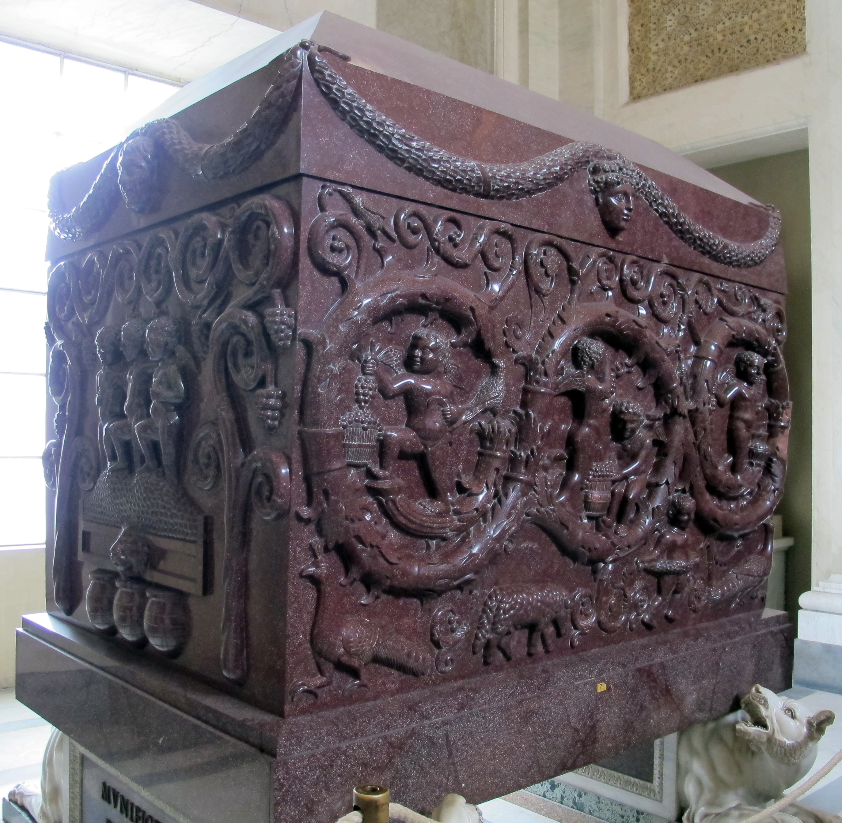 Arte romana nei Musei Vaticani